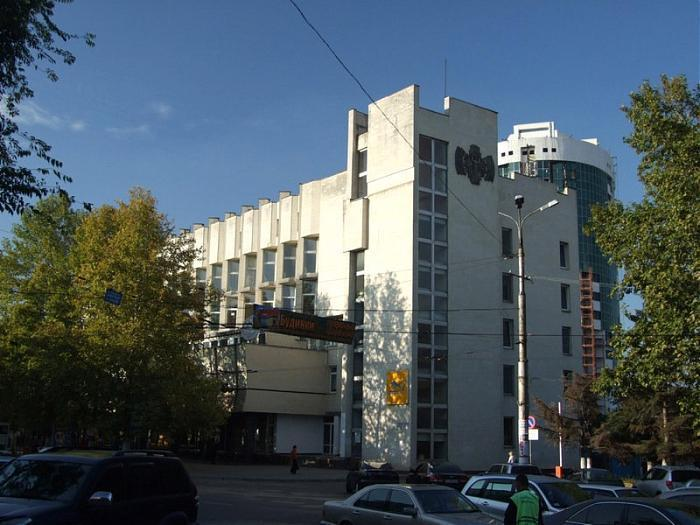 Симферопольский Главпочтамт, ул. Невского, 1, арх. Полегенький, 1982